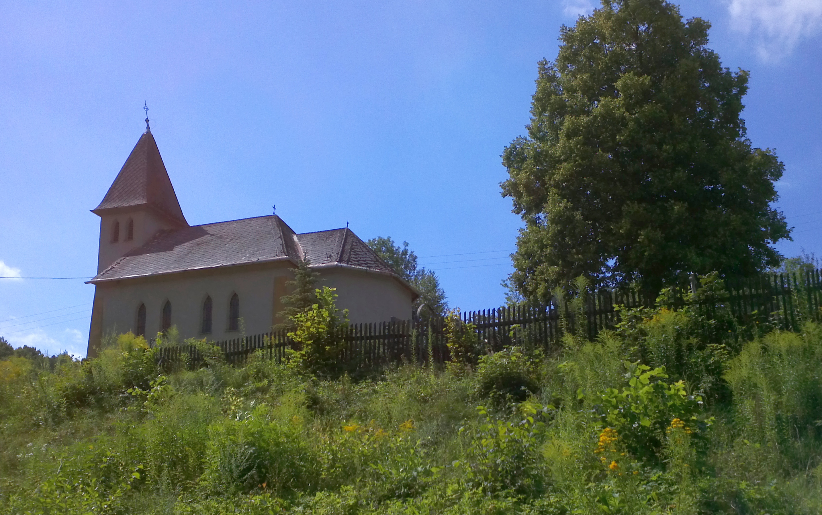 Štědrákova Lhota - kaple sv.Fabiána a Šebestiána a hřbitov.